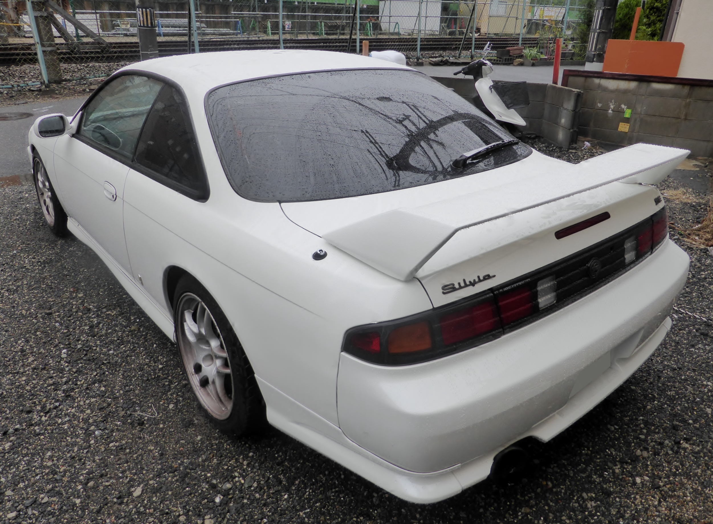 S14後期型日産・シルビアK's SEをリアから撮影。